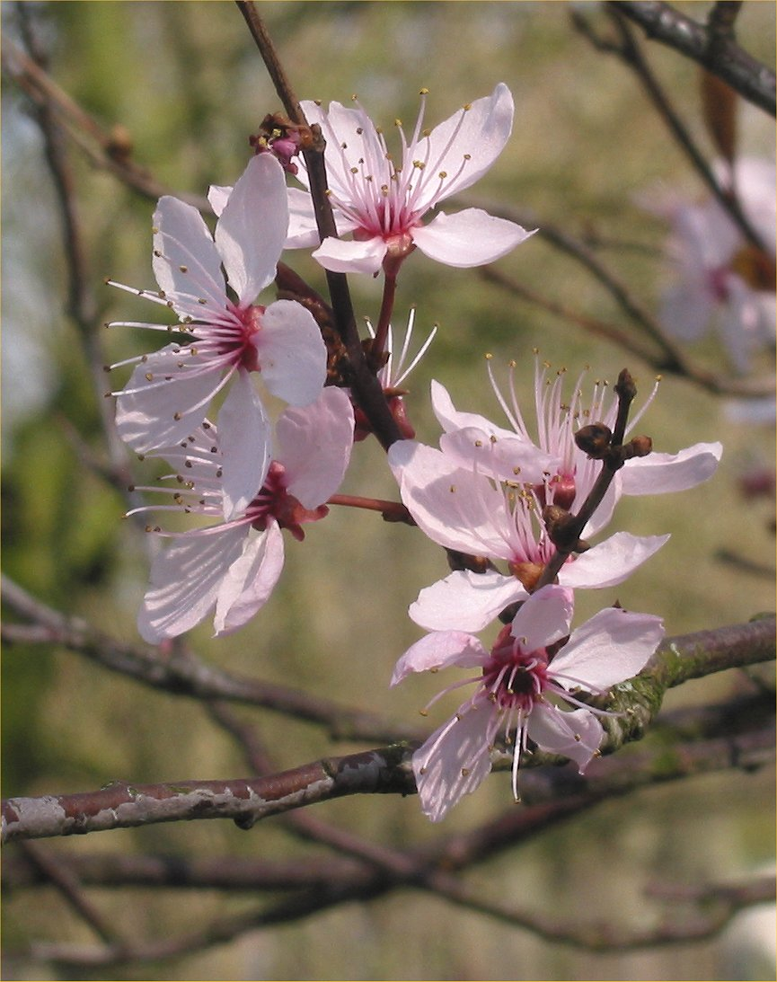 Kerspruim (Prunus cerasifera 'Nigra')